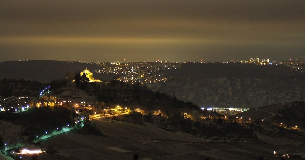 Stuttgart-Rotenberg bei Nacht